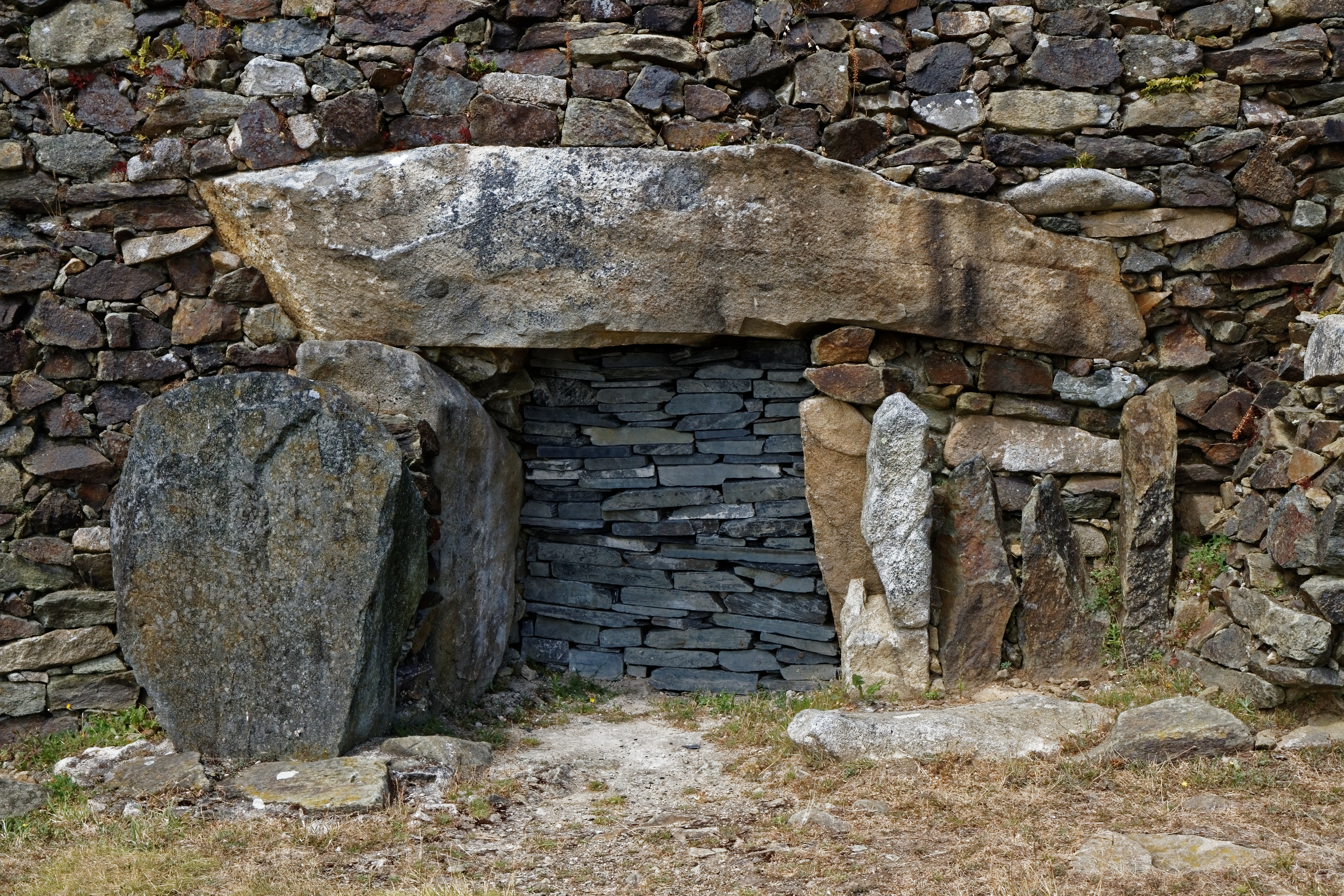 Panorama du Cairn de Barnenez à Plouezoc'h dans le Finistère. .